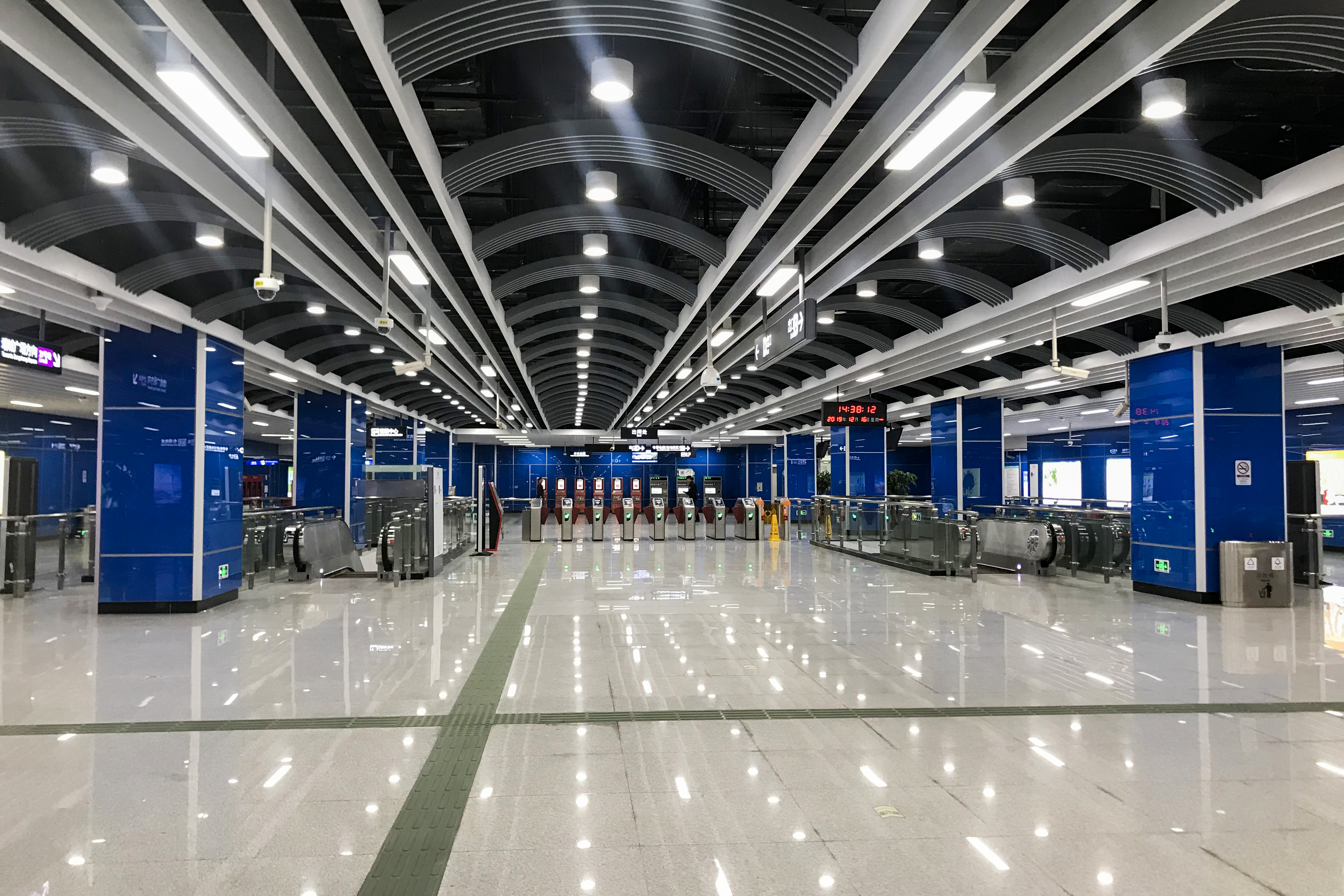 广州地铁镇龙西站